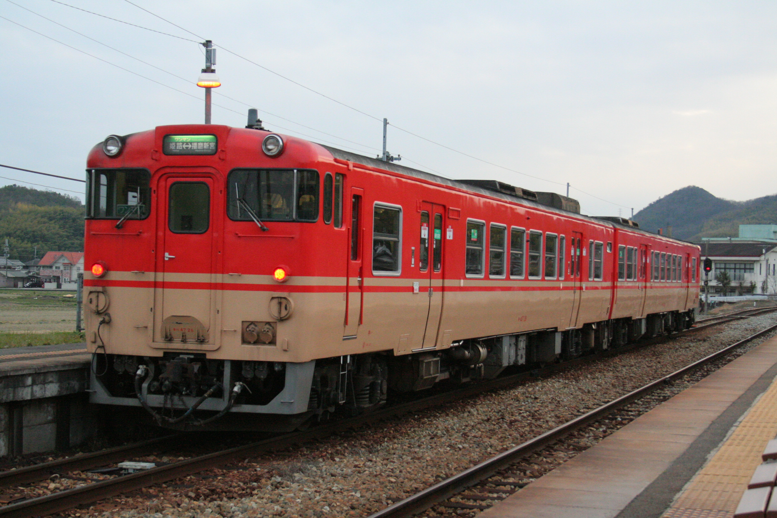 JR西日本の姫新線にある鉄道駅「太市駅」。 姫路から到着した太市駅に停車中の列車。